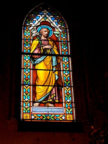 Vitrail Saint Joseph, La Royante, Aubagne en Provence, France